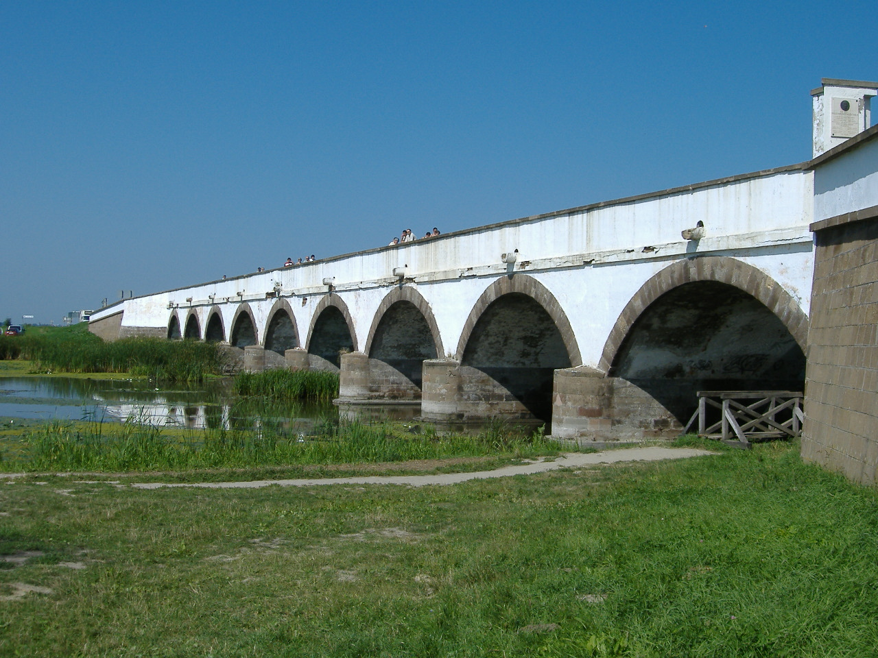 Hortobágy